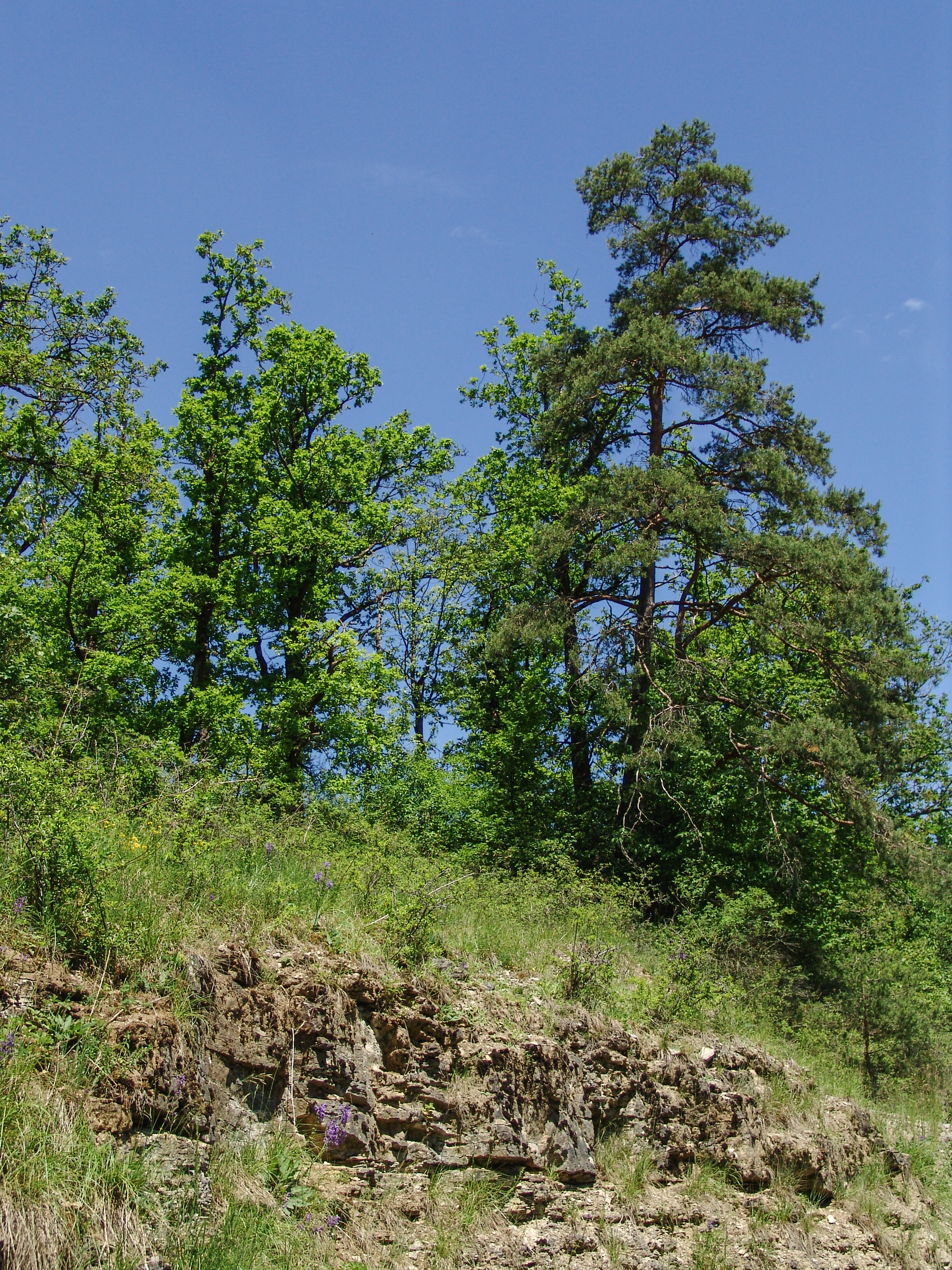 NSG-00363.01 Wacholderheiden südlich Münnerstadt